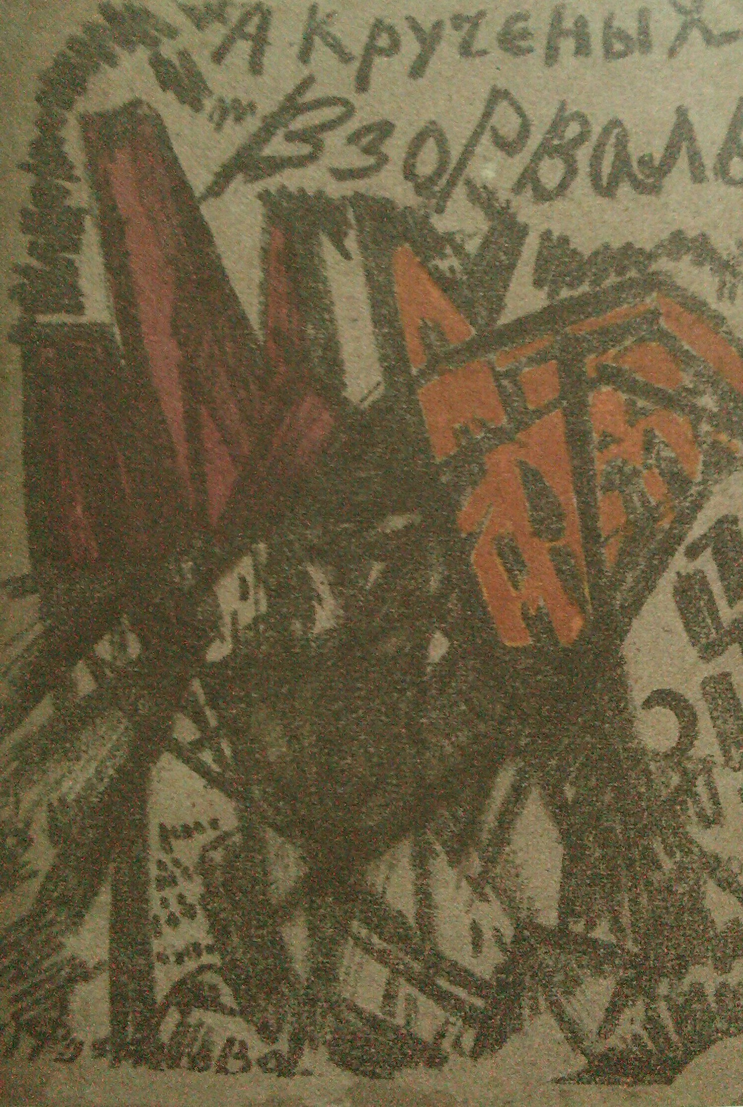 Обложка сборника стихов Крученых "Взорваль"